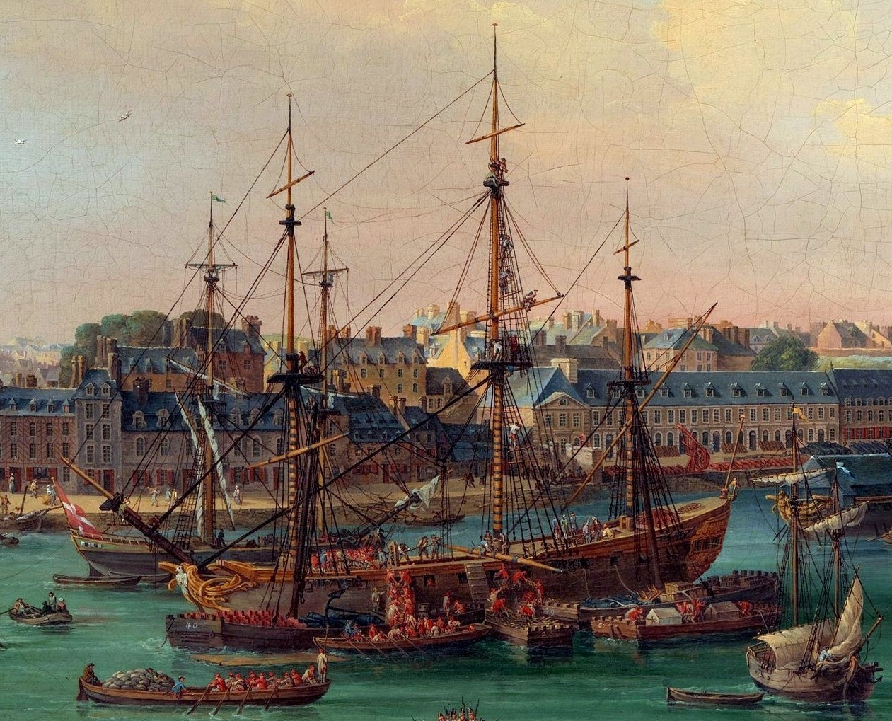 Frégate de 28 ou 30 canons en cours d'armement à Brest en 1773. Détail d'un tableau de Louis-Nicolas Van Blarenberghe.